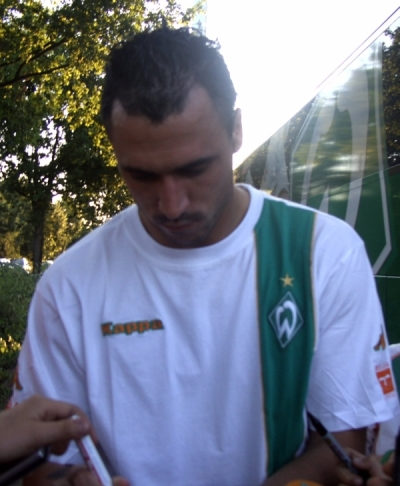 Hugo Almeida